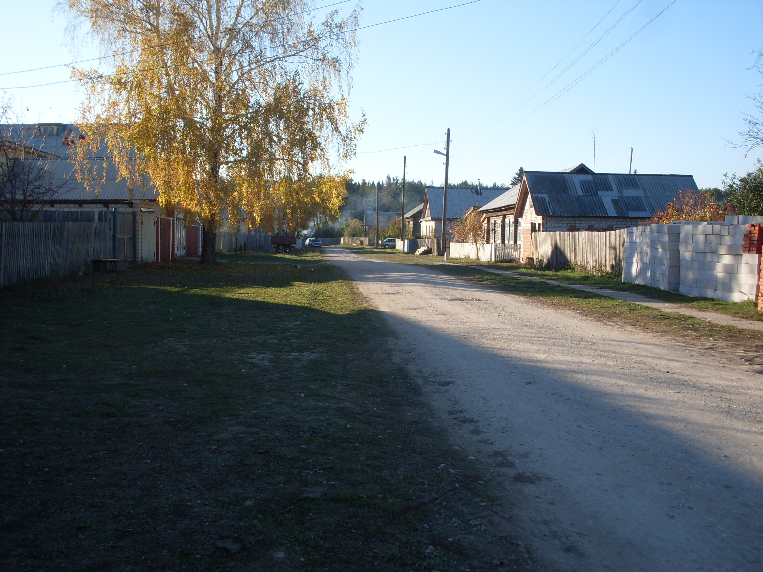 Улица села Горняк Можгинского района Удмуртии